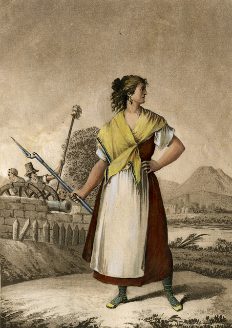 Casta Álvarez, heróica defensora de la ciudad de Zaragoza.